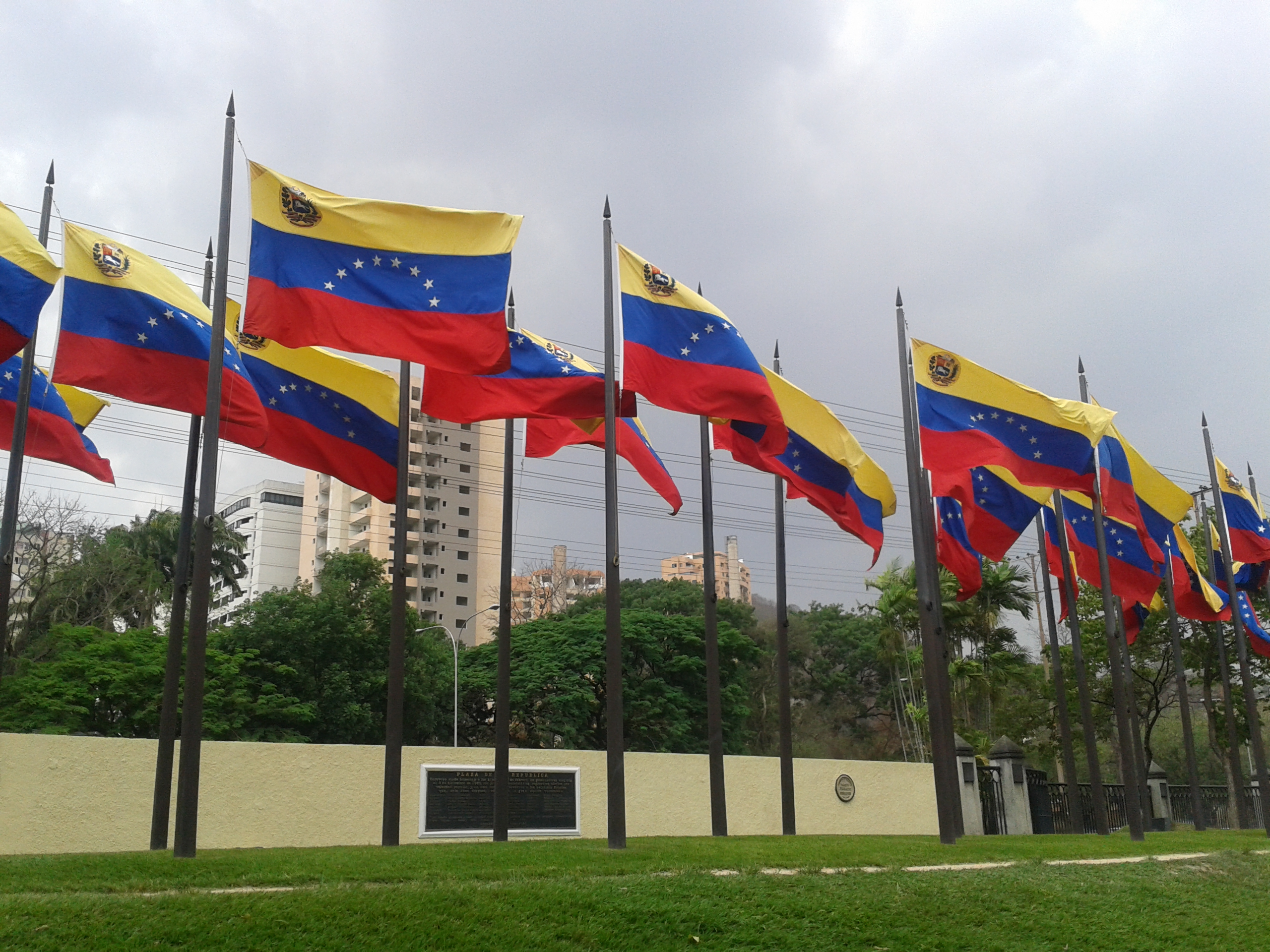 Plaza República: está ubicada en la parte más alta del Parque Negra Hipólita, y conformada por 22 banderas las cuales rinden honor a los primeros 22 gobernadores elegidos el 5 de diciembre del 1989.